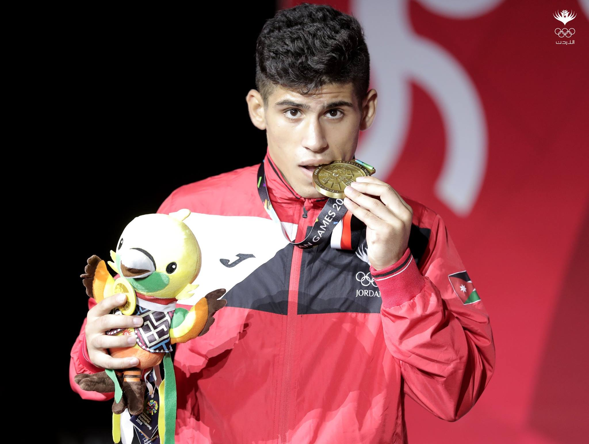 زياد عشيش لحظة تتويجه بالميدالية البرونزية في دورة الألعاب الآسيوية عام 2018